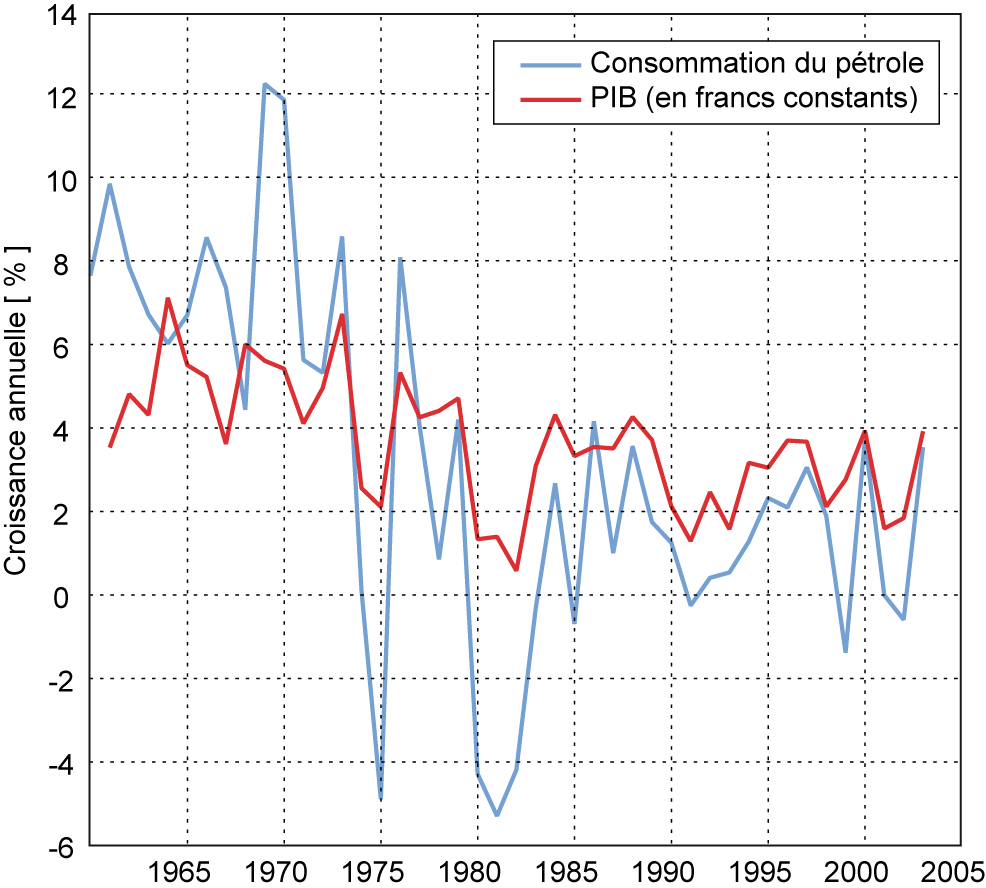 Comsommation pétrole croissance globals